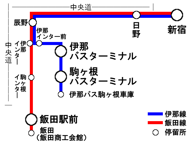 中央高速バス新宿 - 伊那・飯田線路線図